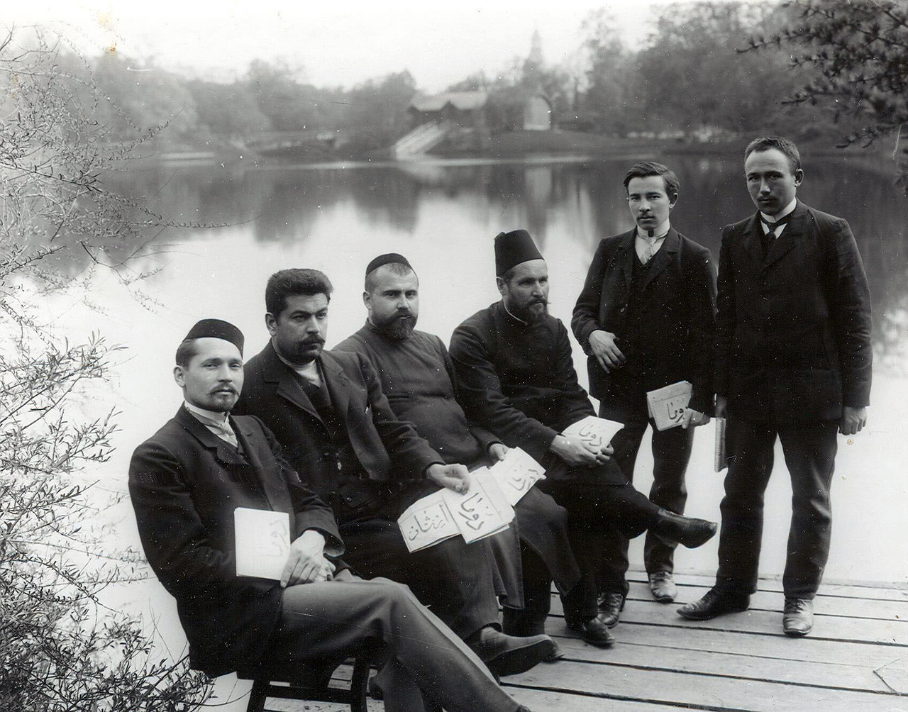 Мусульманская Трудовая группа с одним из номеров газеты "Дума", выпускавшейся этой группой в течение работы 2-й гос. Думы. Слева направо: К. Г. Хасанов, З. Э. Зейналов, Х. Атласов, Х. Масагутов, Фуад Туктаров (основной редактор газеты "Дума", журналист), А. Беремжанов. (Газета "Дума" издавалась в Санкт-Петербурге в апреле-мае 1907 года на татарском и азербайджанском языках арабским шрифтом, вышло 6 номеров. Газета была запрещена "в административном порядке с возбуждением судебного преследования и наложением ареста")